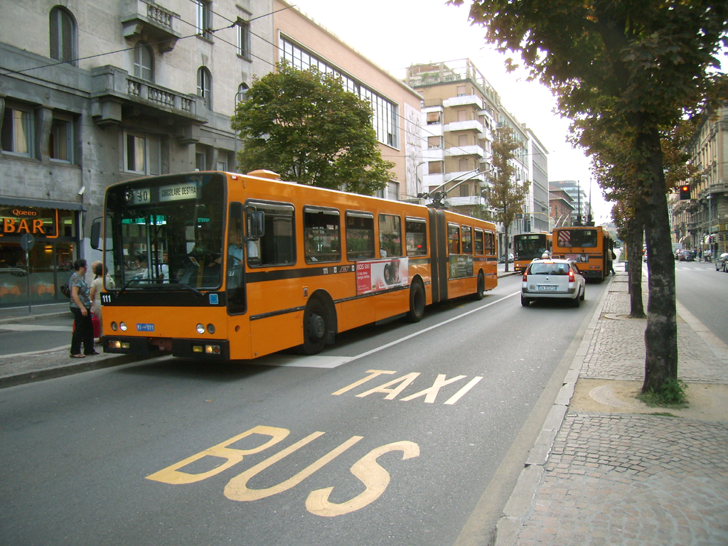 Vettura filoviaria 111 dell'ATM di Milano, in servizio sulla linea 90 (circolare destra), in via Tonale.